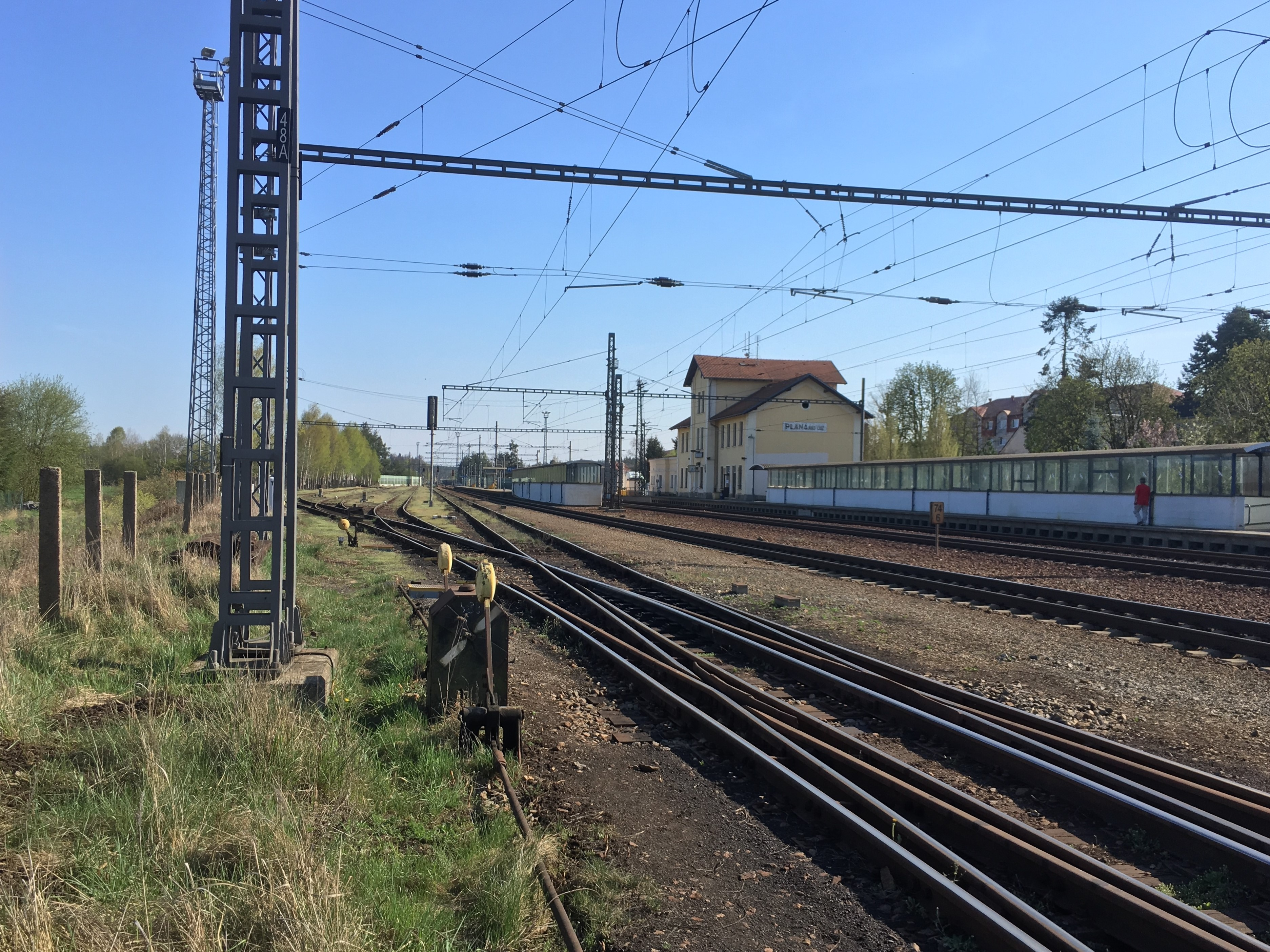 Stanice Planá nad Lužnicí spolu s kolejištěm a podchody. Foceno z druhé strany koridoru.